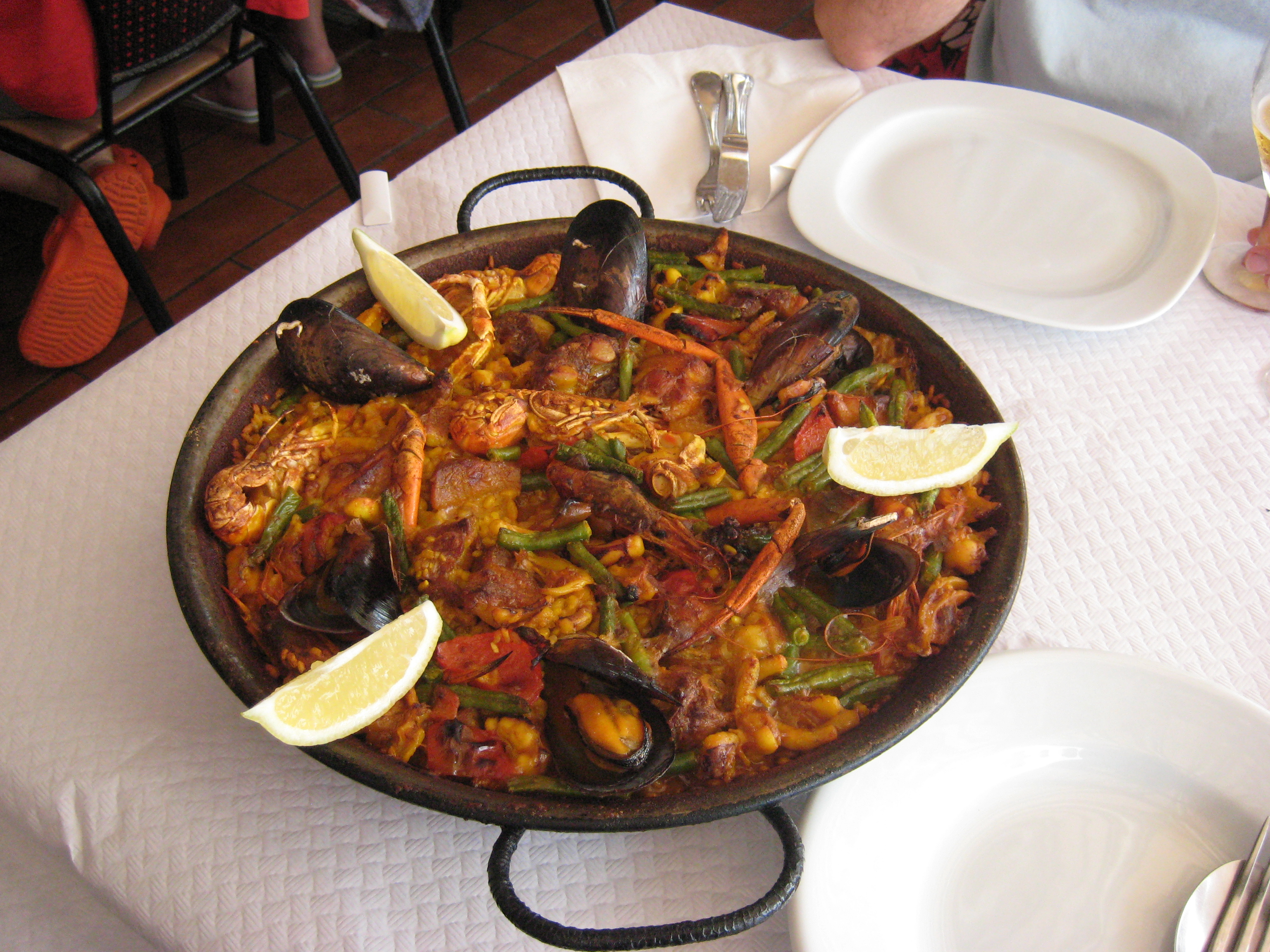 Una paella, en Mallorca.